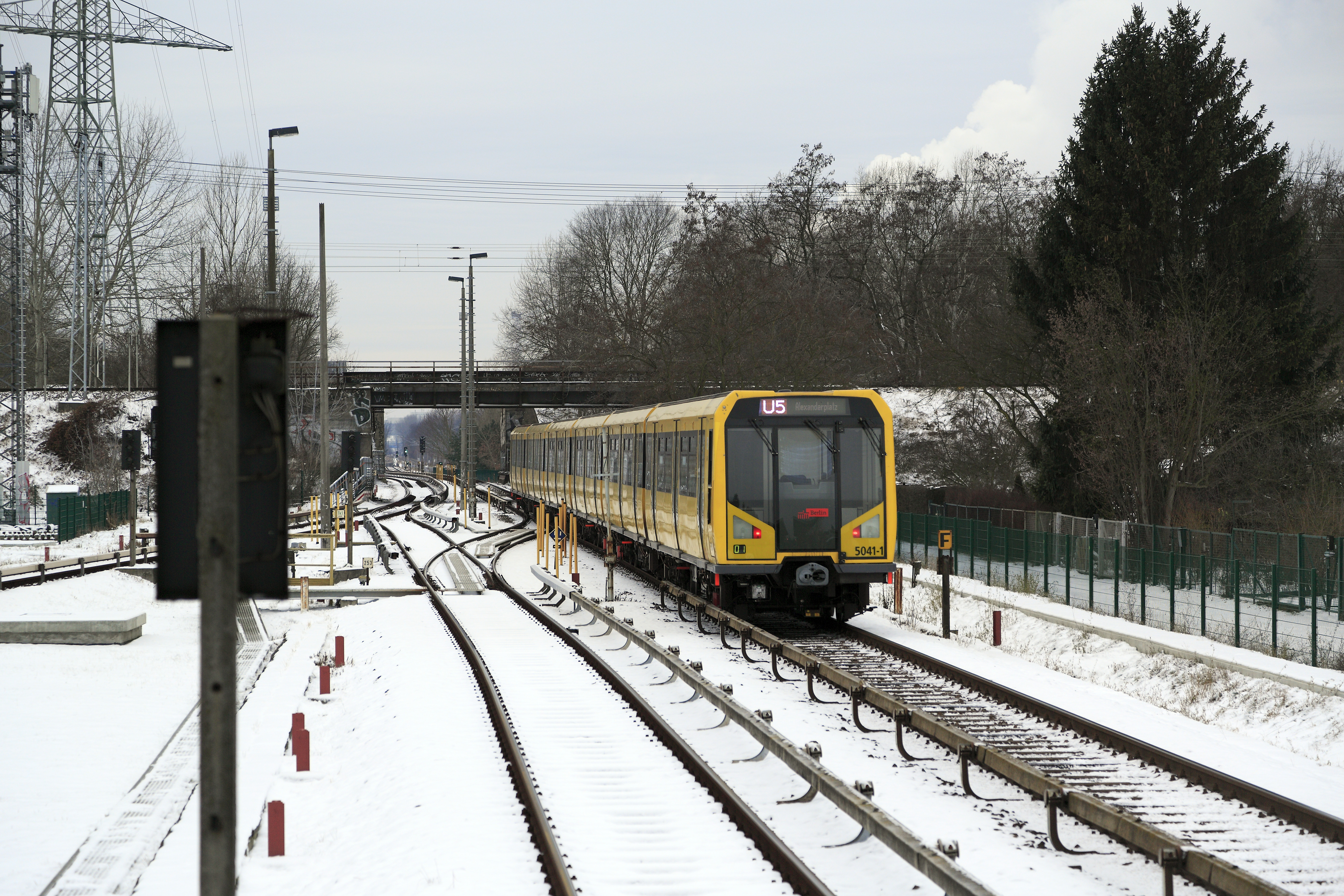 Typ H, Zug der Linie U5 Hönow–Alexanderplatz, Nachschuss. Der Seitenbahnsteig wird im Regelbetrieb von den Zügen Richtung Westen genutzt. Die Weiche 253 ist eine klassische Zwieschutzweiche und im Aufnahmemoment in Funktion.